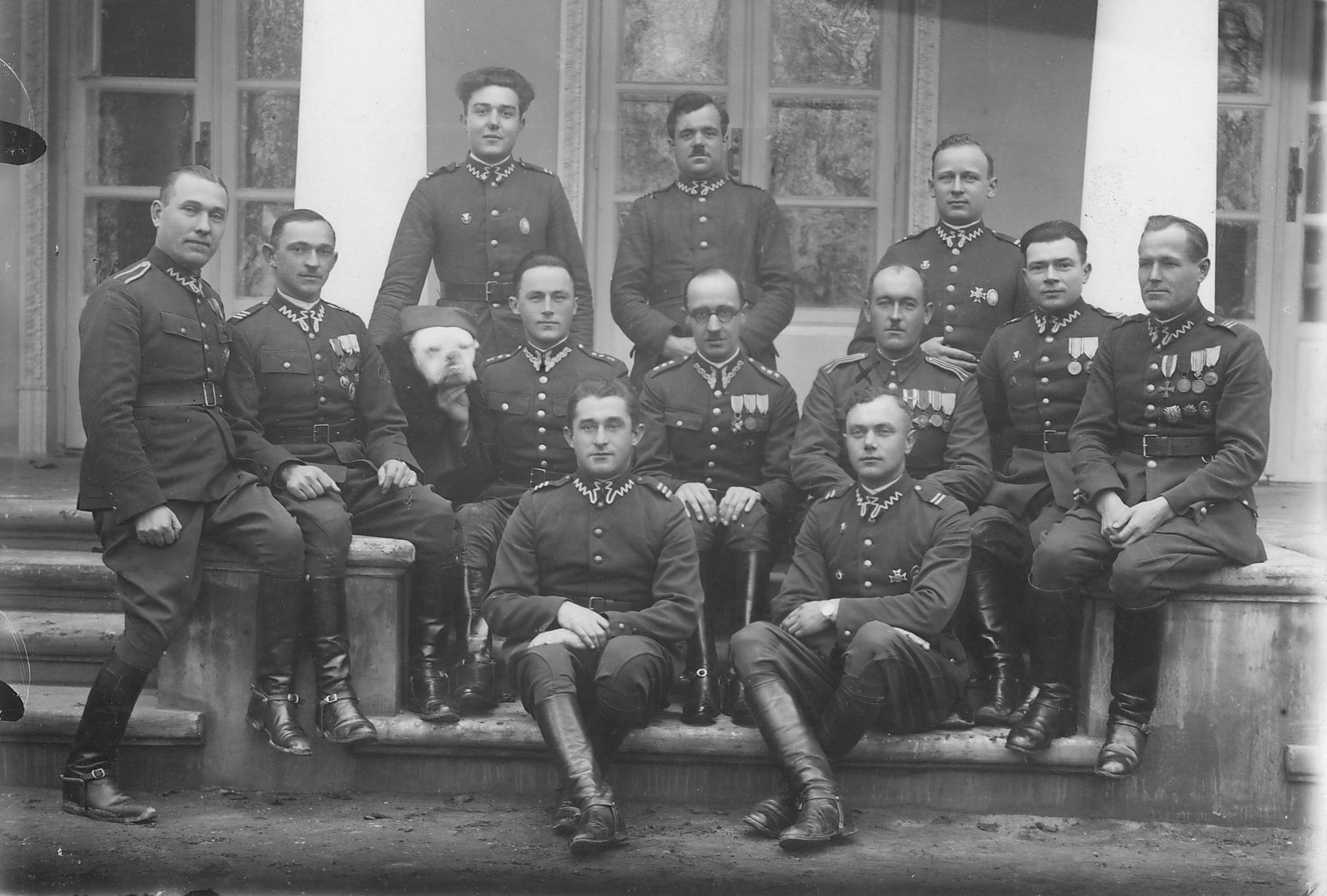 Oficerowie i podoficerowie 16 Szwadronu Kawalerii KOP przed pałacem w Bystrzycach nad Słuczą. Od lewej siedzą wachmistrz [imię?] Korościk i plutonowy Antoni Krawczyk, w środku (w okularach) siedzi dowódca 16 Szwadronu Kawalerii KOP „Bystrzyce” rotmistrz Konstanty Kozłowski; po jego prawej stronie dowódca plutonu starszy wachmistrz Franciszek Ratajczak.